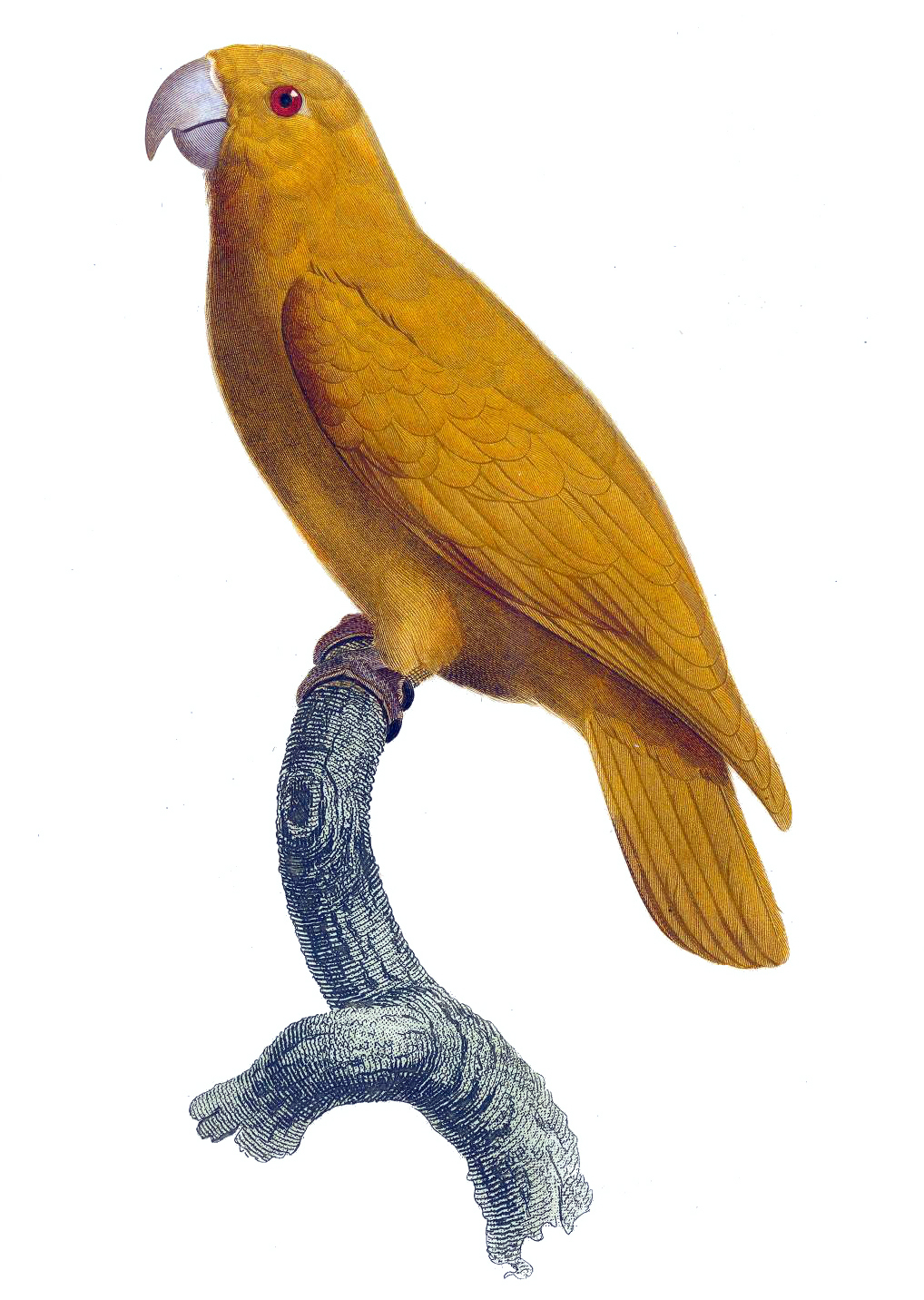 Plate 138: Le Perroquet d'or. Geoffroyus or Amazona aureus Illustrations from Histoire naturelle des perroquets. Written by François Le Vaillant. Volume II (1805).